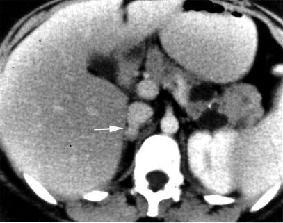 Pheochromocytoma